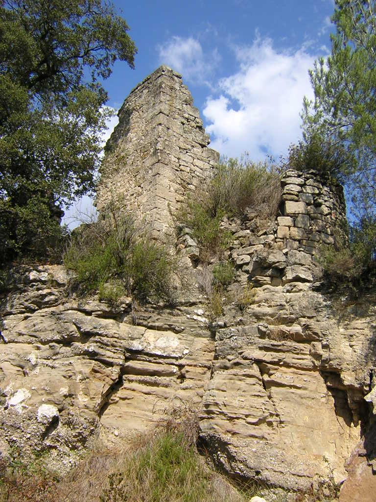 Pumanyà (Monistrol de Calders, Moianès)